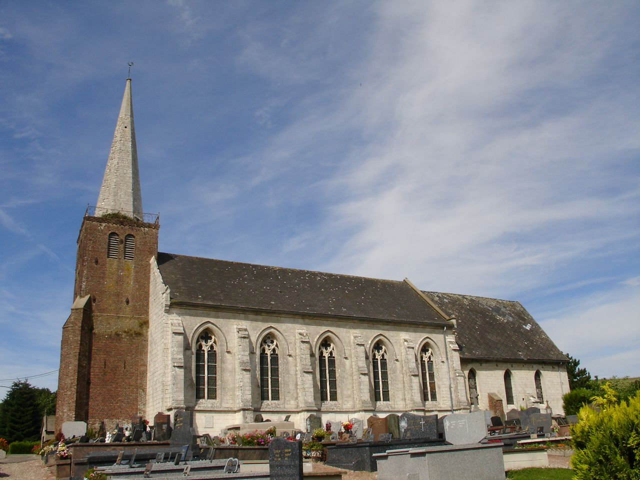 Église de Bléquin